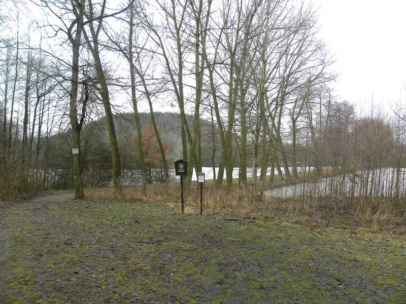 Přírodní rezervace Podhůrka